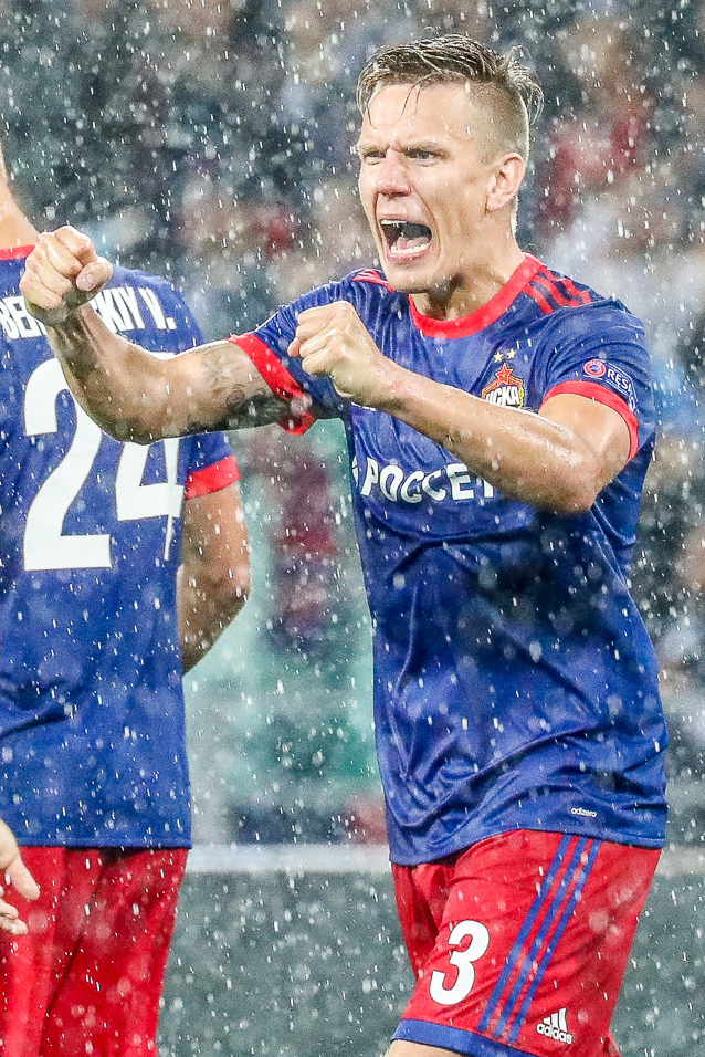 ЦСКА - «Янг Бойз»